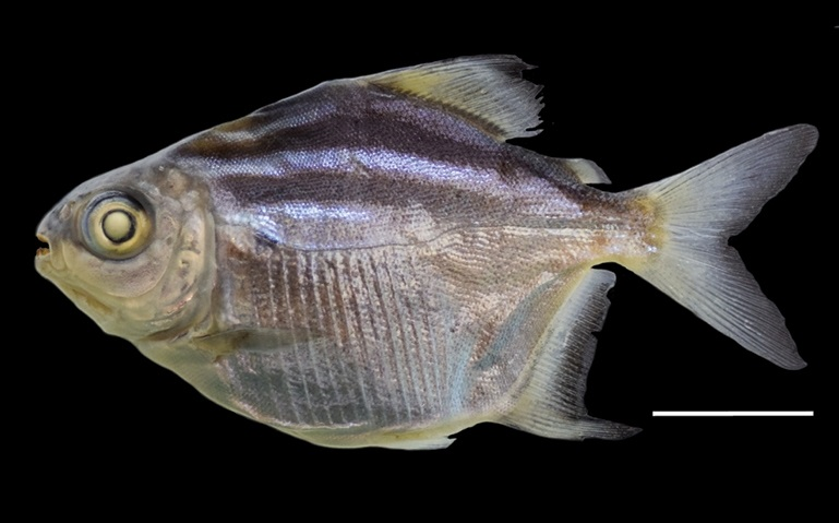 Acnodon oligacanthus, Río Calçoene, Brasil. Melo BF, Benine RC, Britzke R, Gama CS, Oliveira C (2016) An inventory of coastal freshwater fishes from Amapá highlighting the occurrence of eight new records for Brazil. ZooKeys 606: 127-140.